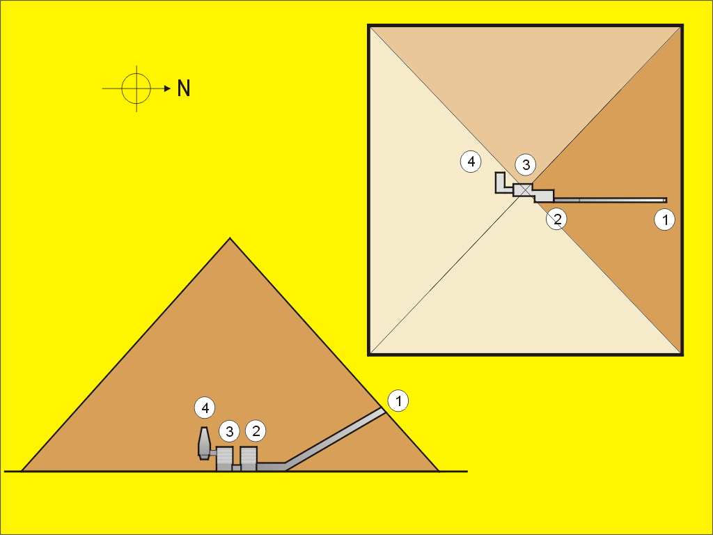 Schematyczny rysunek, przedstawiający plan i przekrój Piramidy Czerwonej w Dahszur.